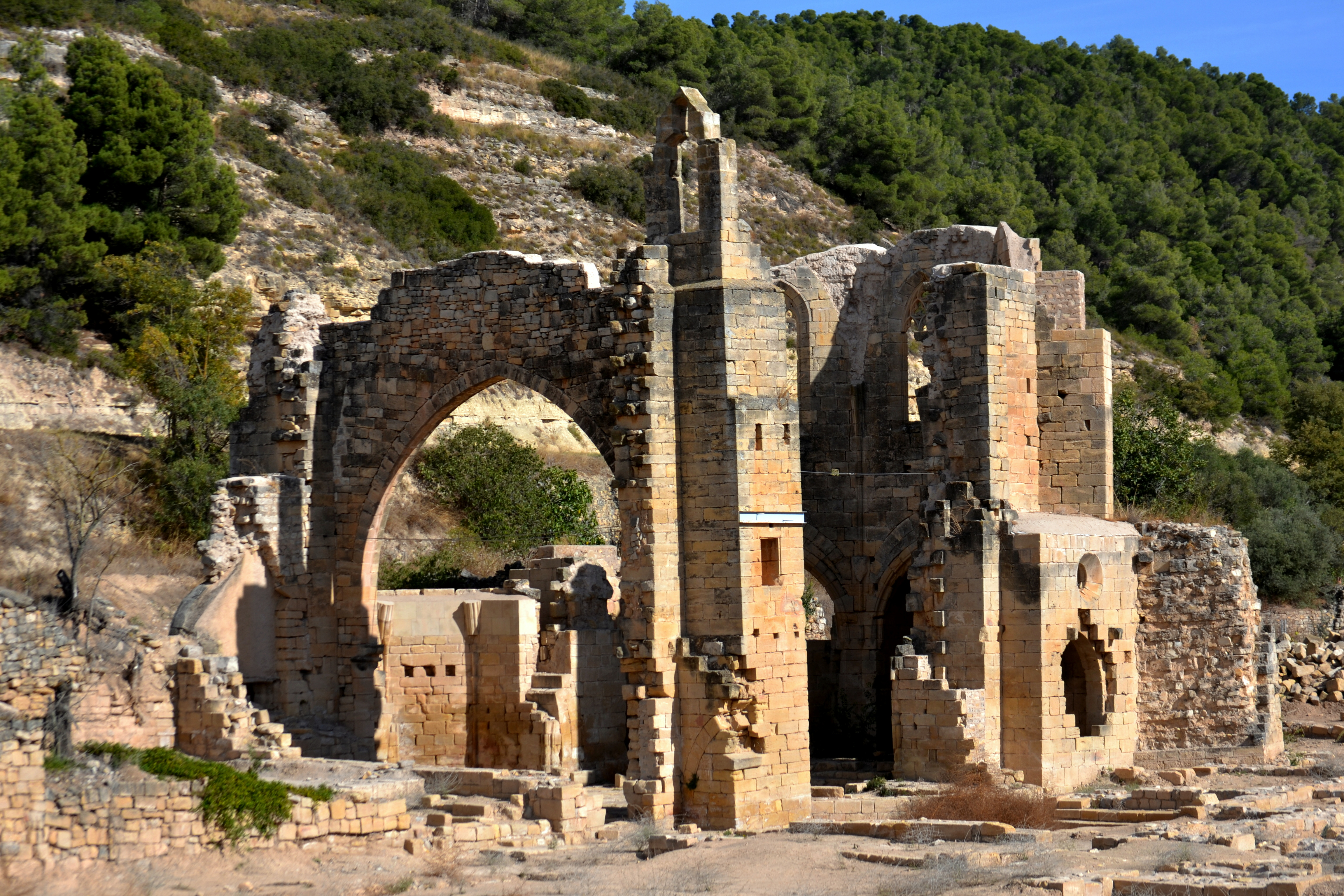 Restes del monestir de Vallsanta (Guimerà)